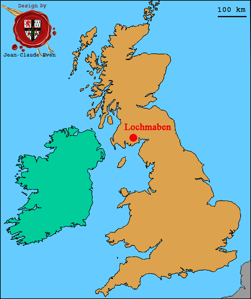 Lochmaben - Locus Maponi